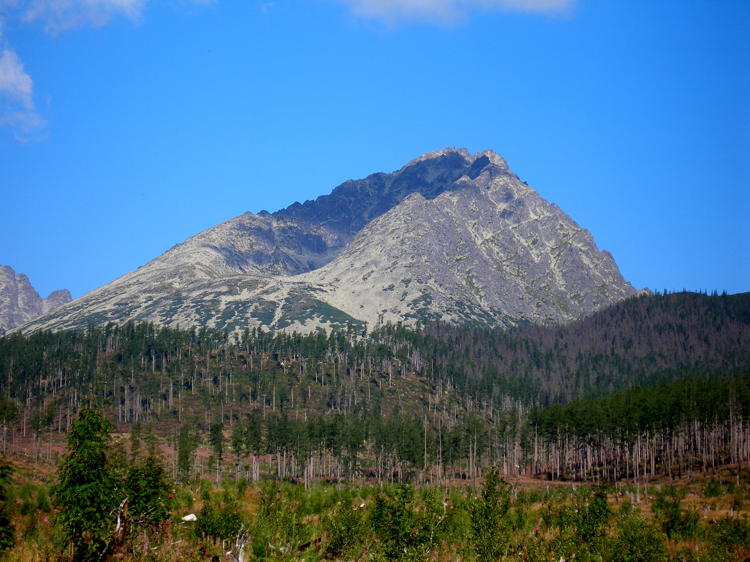 Okolie osady Tatranské Zruby. V pozadí masív Gerlachovského štítu